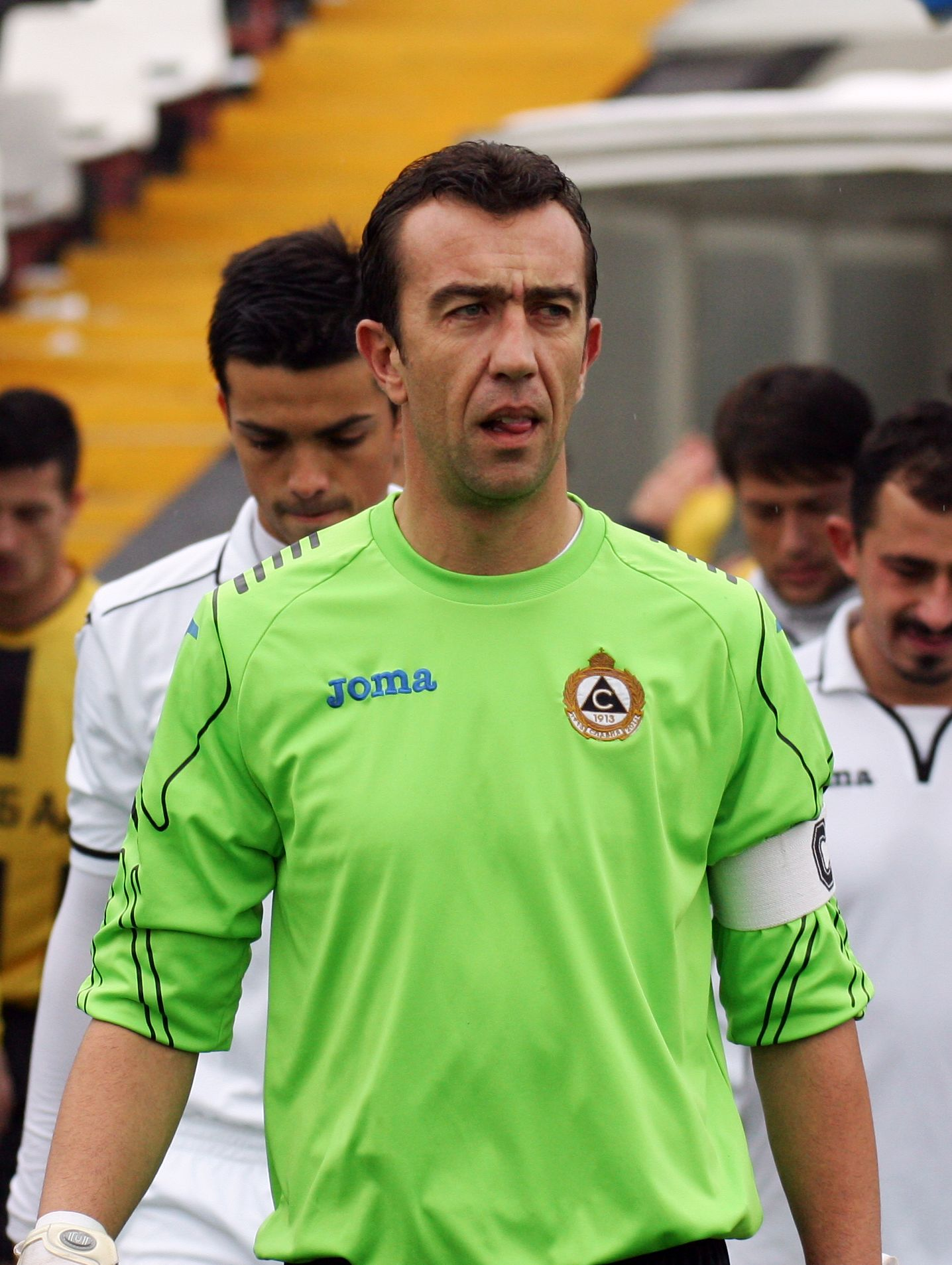 Георги Стоянов Петков е български футболист, вратар на Славия (София). Дългогодишен играч на Левски (София). Има 16 мача за националния отбор на България.